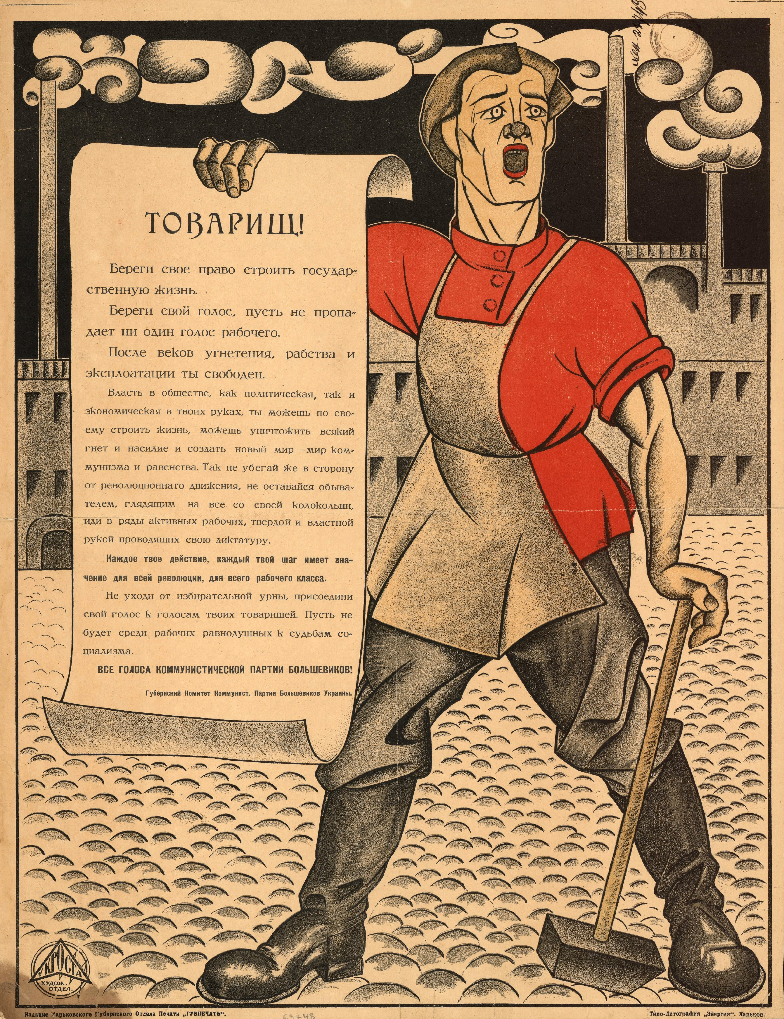 Плакат «Товарищ! Береги своё право строить государственную жизнь». Харьков : Художественный отдел УкрРОСТА ; Харьковский губернский отдел печати «Губпечать», [б. г.] (Харьков : Типолитография «Энергия»). Цветная литография, 1 лист, 63×48 см